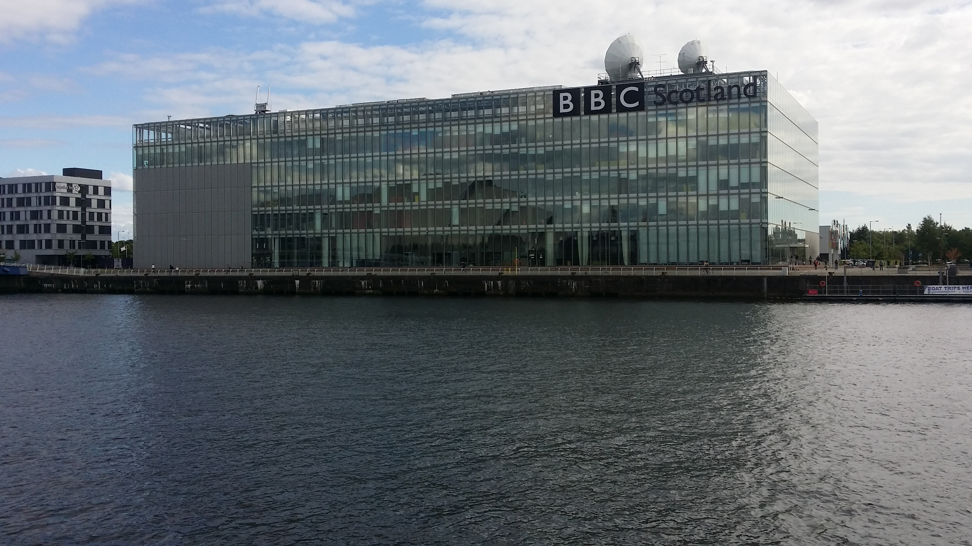 BBCren egoitza Eskozian, Glasgow hirian.